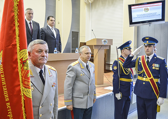 Заместитель командующего войсками Западного военного округа генерал-лейтенант Сергей Кураленко (в центре) во время вручения знамени Карельской региональной общественной организации ветеранов ВС РФ